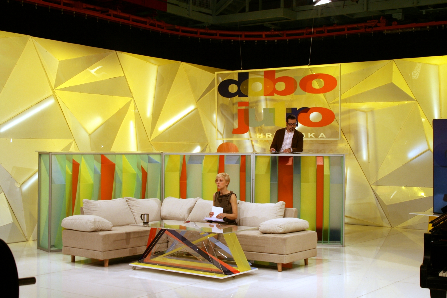 voditelji emisije Dobro jutro, Hrvatska, Blaženka Leib i Domagoj Novokmet na HRT-u